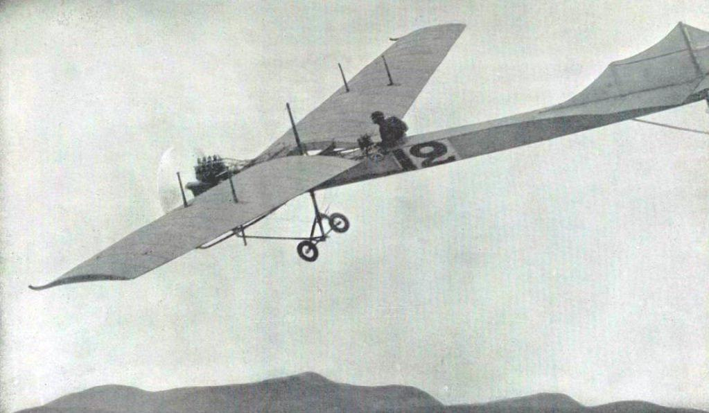 Hubert Latham, vainqueur de la croisière Nice-Cap-Ferrat-Nice en avril 1910 sur Antoinette VII, et RM de vitesse terrestre.